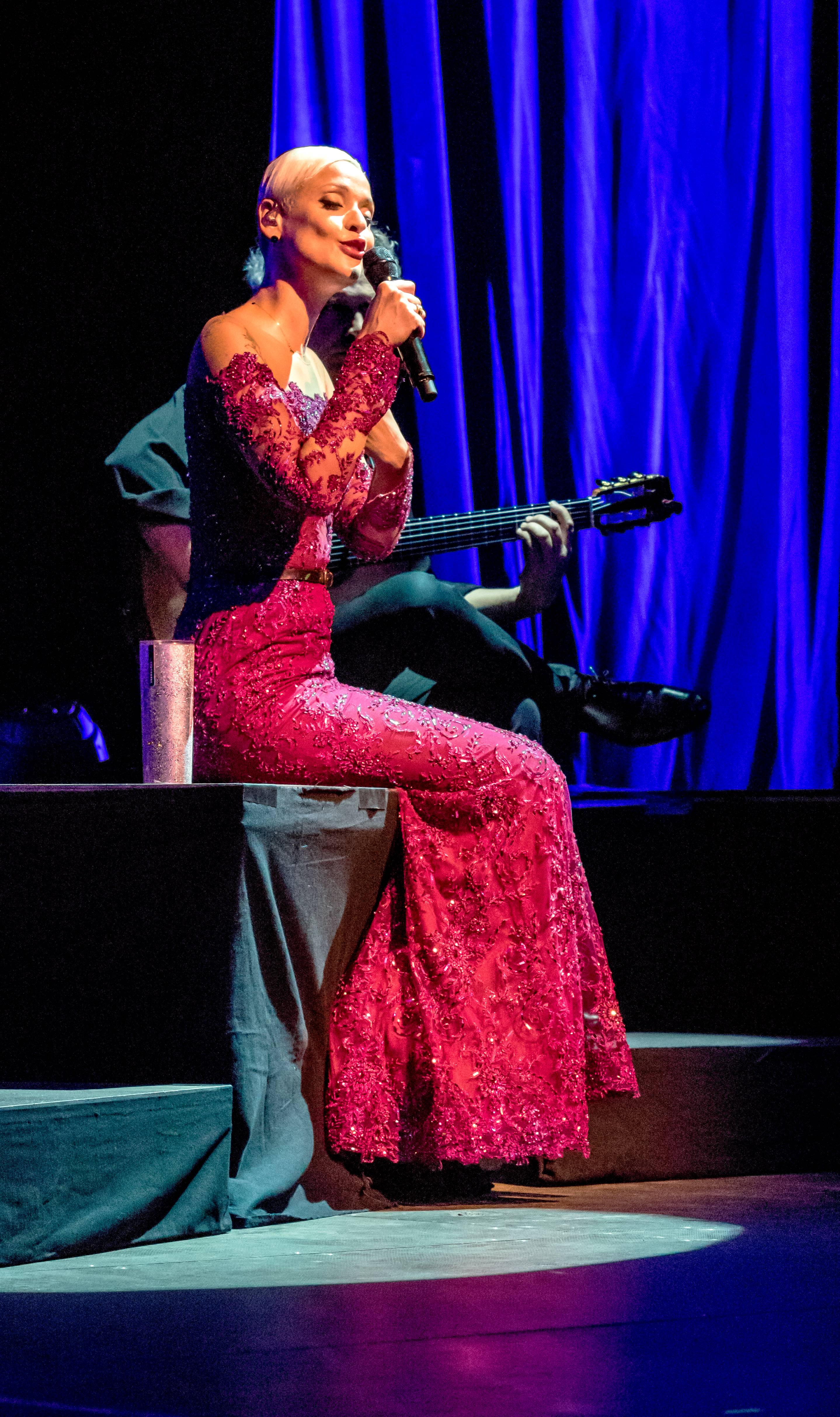 Bilder vom ZMF 2015 Mariza